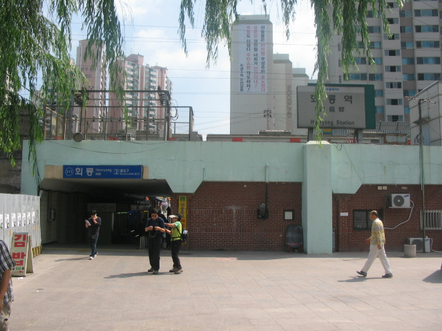 回龍駅 2番出口